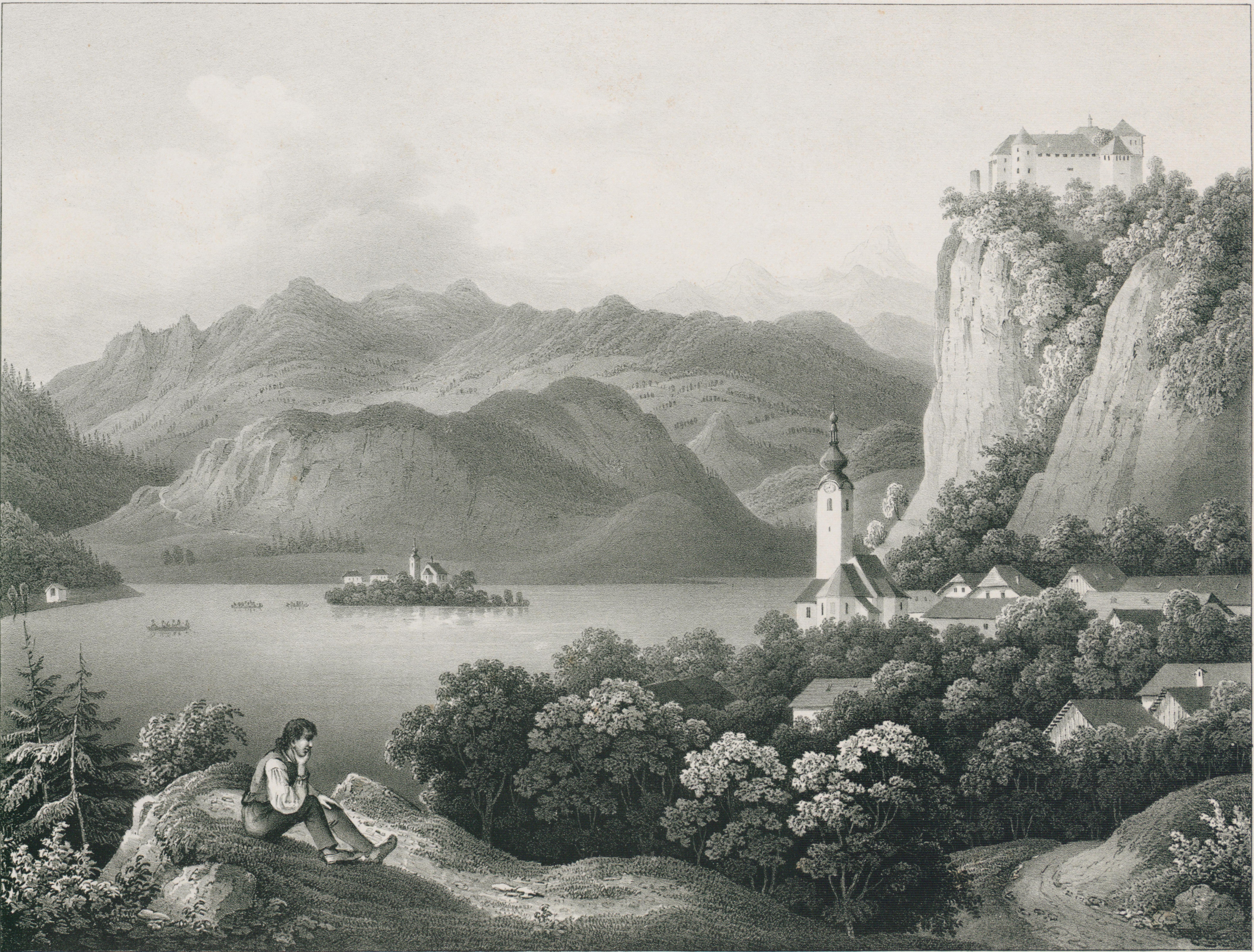 Litografija Bleda iz zbirke Malerische Ansichten aus Krain.